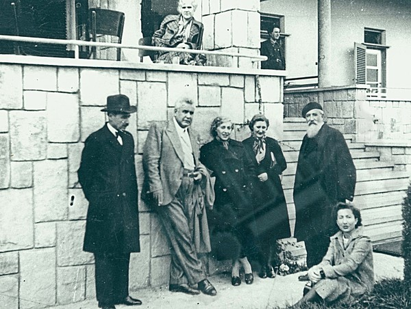 Михаил Герджиков (първият от дясно наляво, прав) и Сирак Скитник (вторият от ляво надясно) с компания.